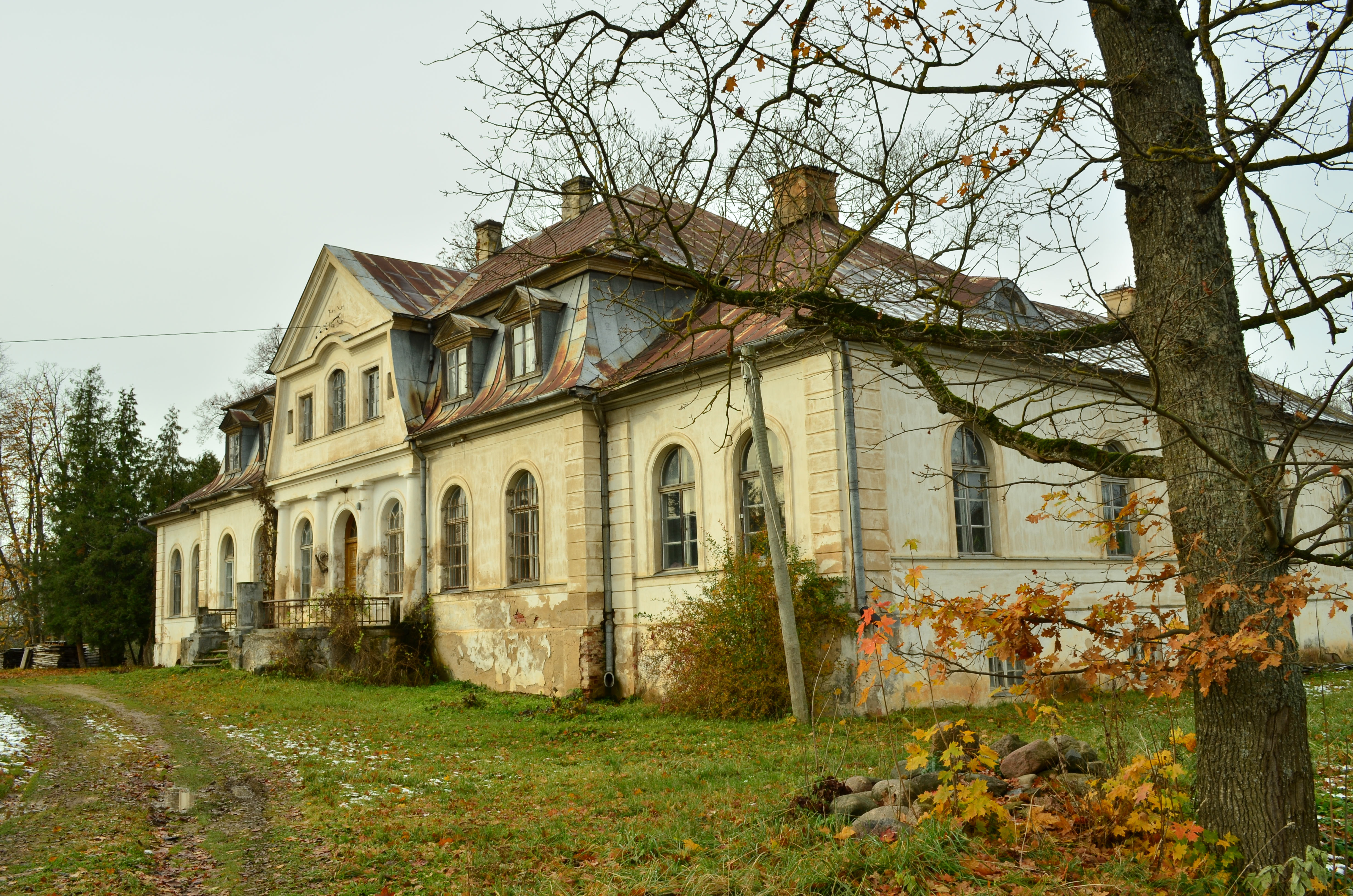 Dzīvojamā ēka, Zaļenieku pagasts